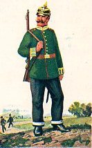 Preußischer Landgendarm der XI. Gendarmerie-Brigade Kassel. Dunkelgrüner Waffenrock, schwarzblaue Hose